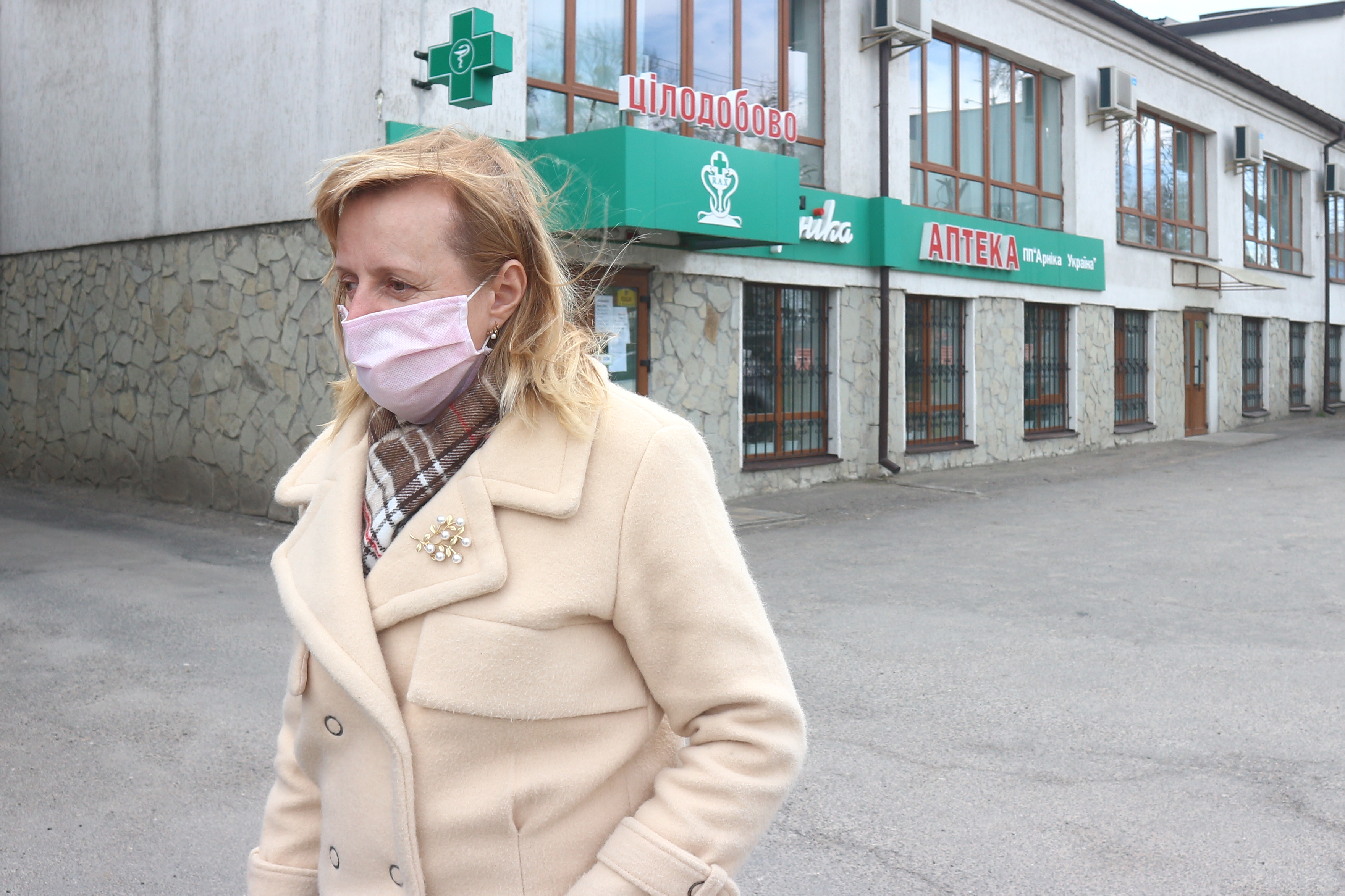 women wearing mask during the COVID-19 pandemic in Khmelnytskyi, April 2020